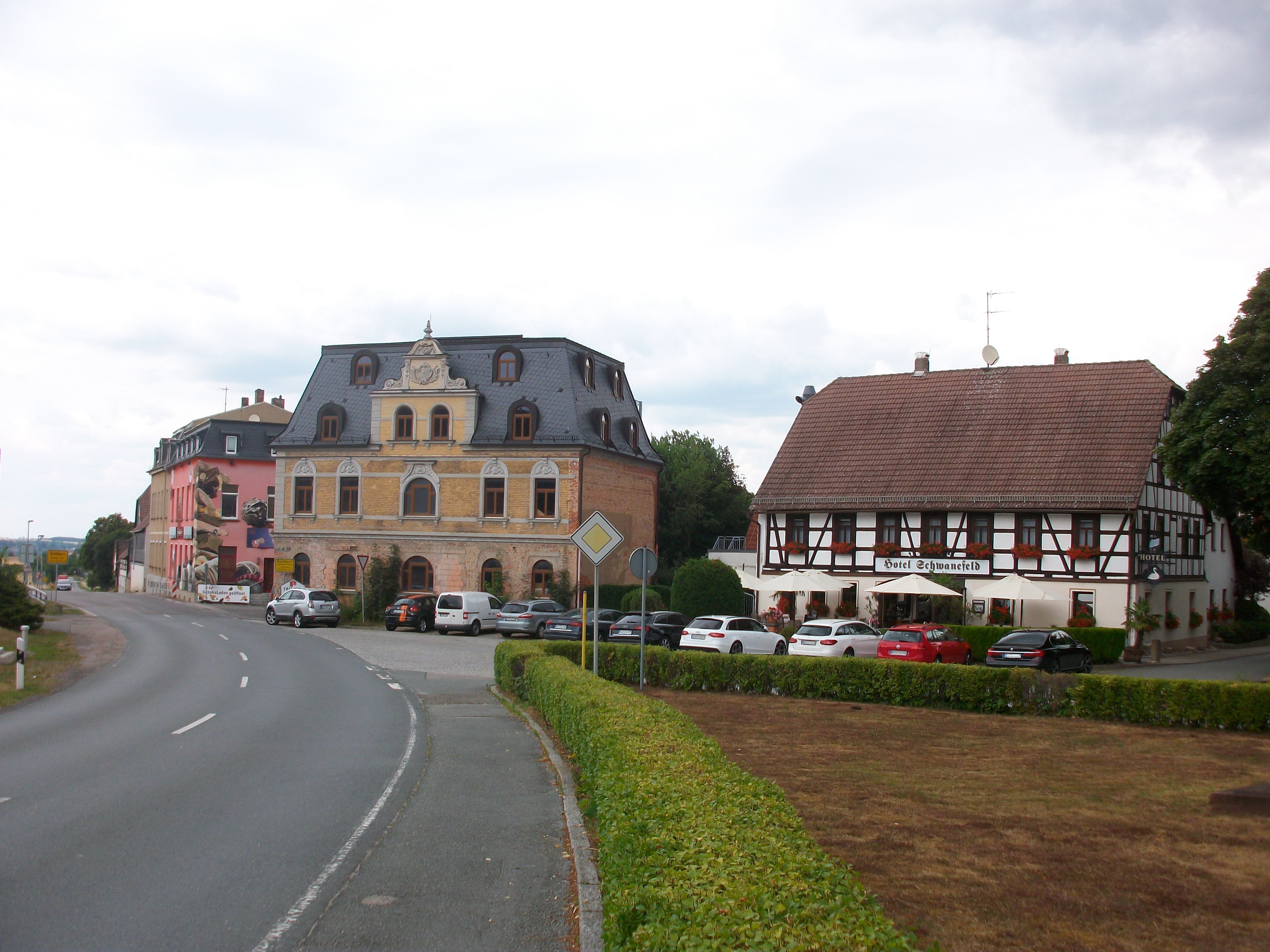 Meerane, Hotel Schwanefeld mit ehem. Posthalterei (links)